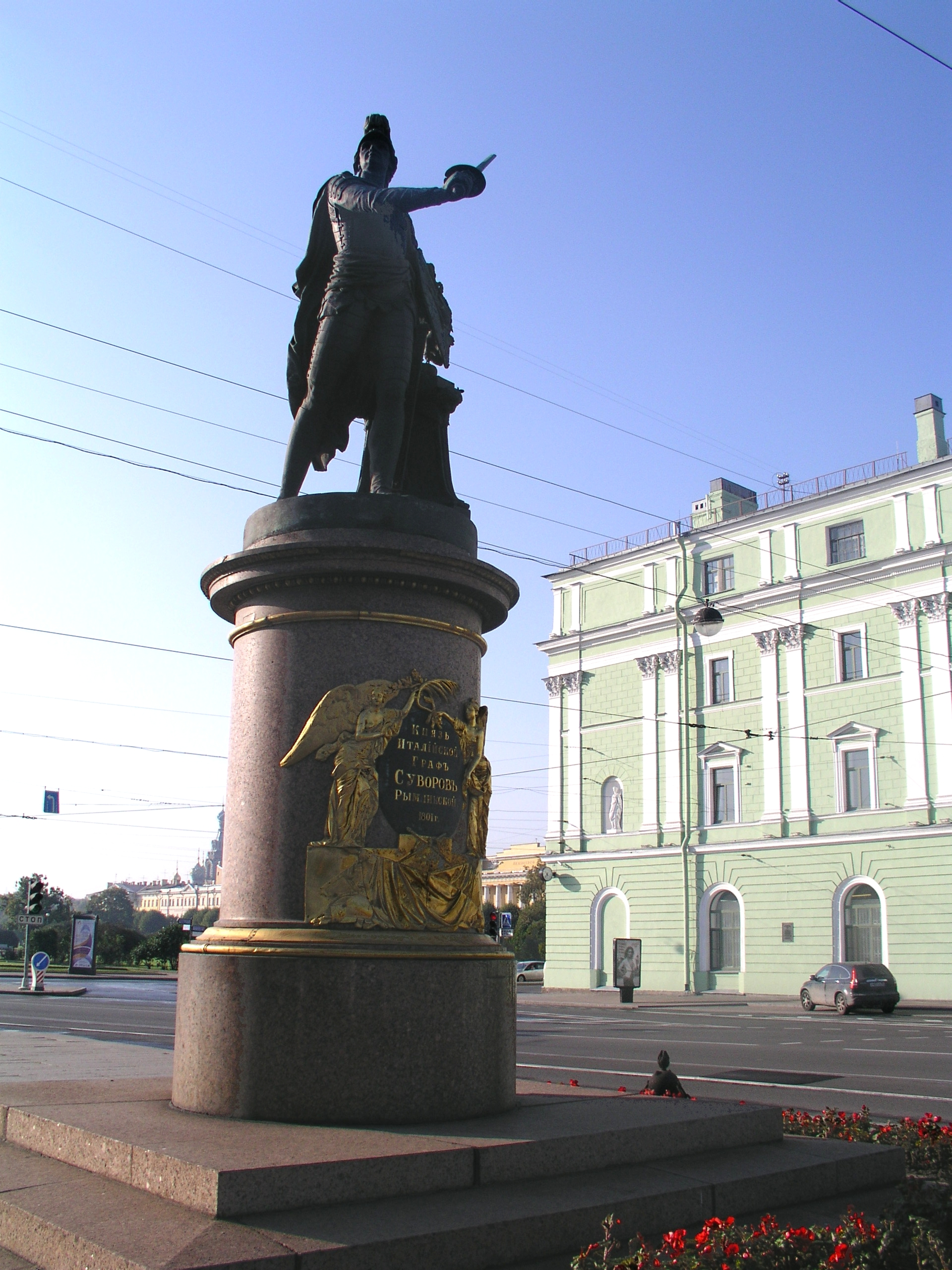 Denkmal für Suworow am Rande des Marsfeldes, vor der Troizki-Brücke